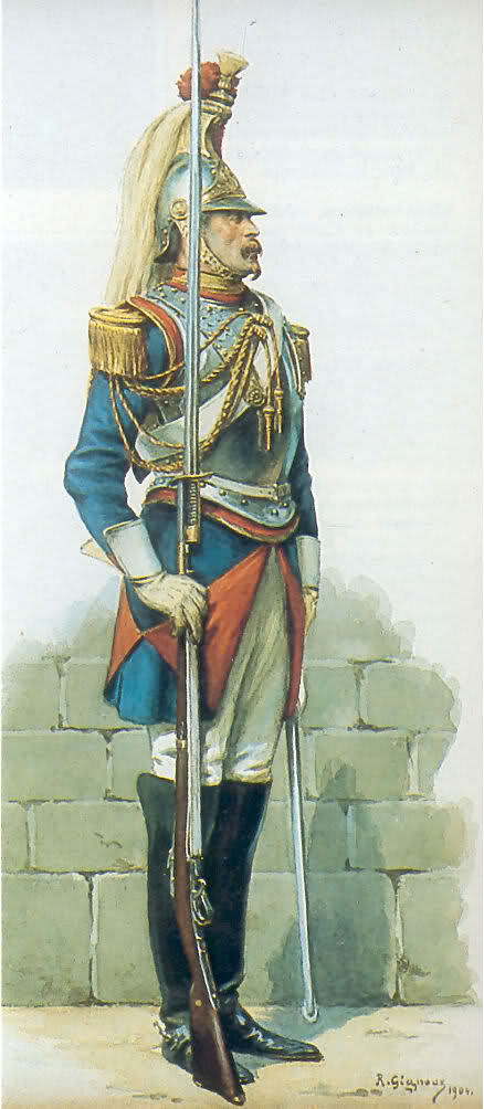 Un Cent-Garde du Second Empire